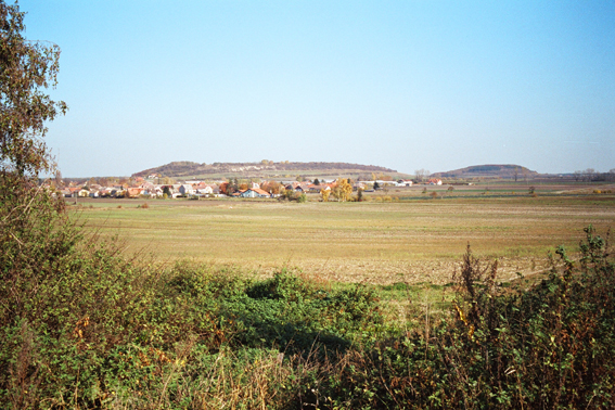 Přerovská (v popředí) a Semická hůra - vyfotografováno z hřebenu Na Vrších